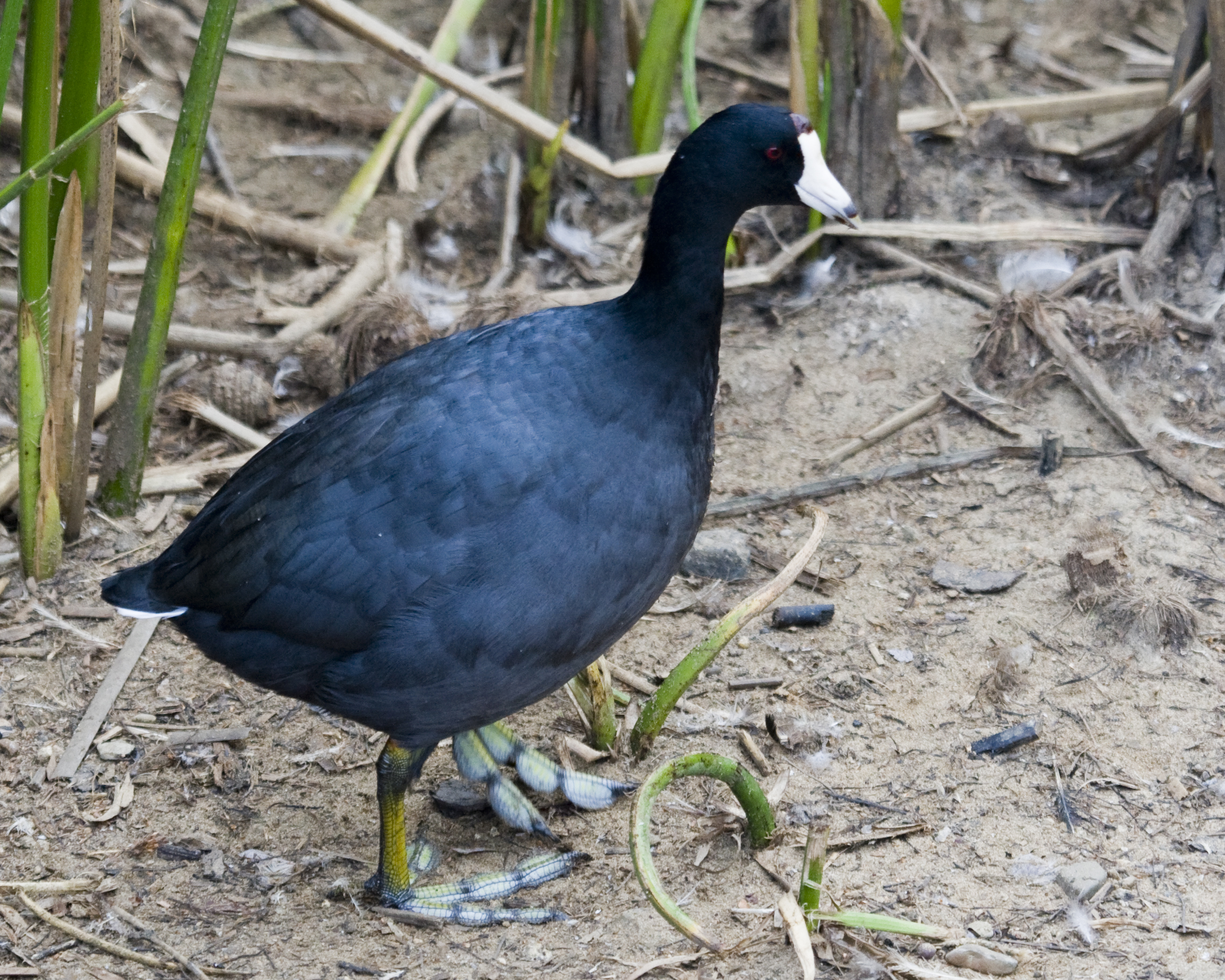 Foulque d'Amérique (Fulica americana)